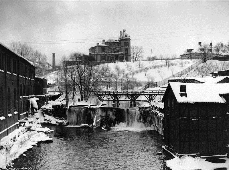 Akerselven ved Bentse Brug 1901. Midt i bakgrunnen villaen i Sandakerveien 52 som ble oppført i 1889-91 for direktøren ved Akerselvens Papirfabrikker, Hartwig Bache-Wiig, etter tegninger av Harald Olsen.